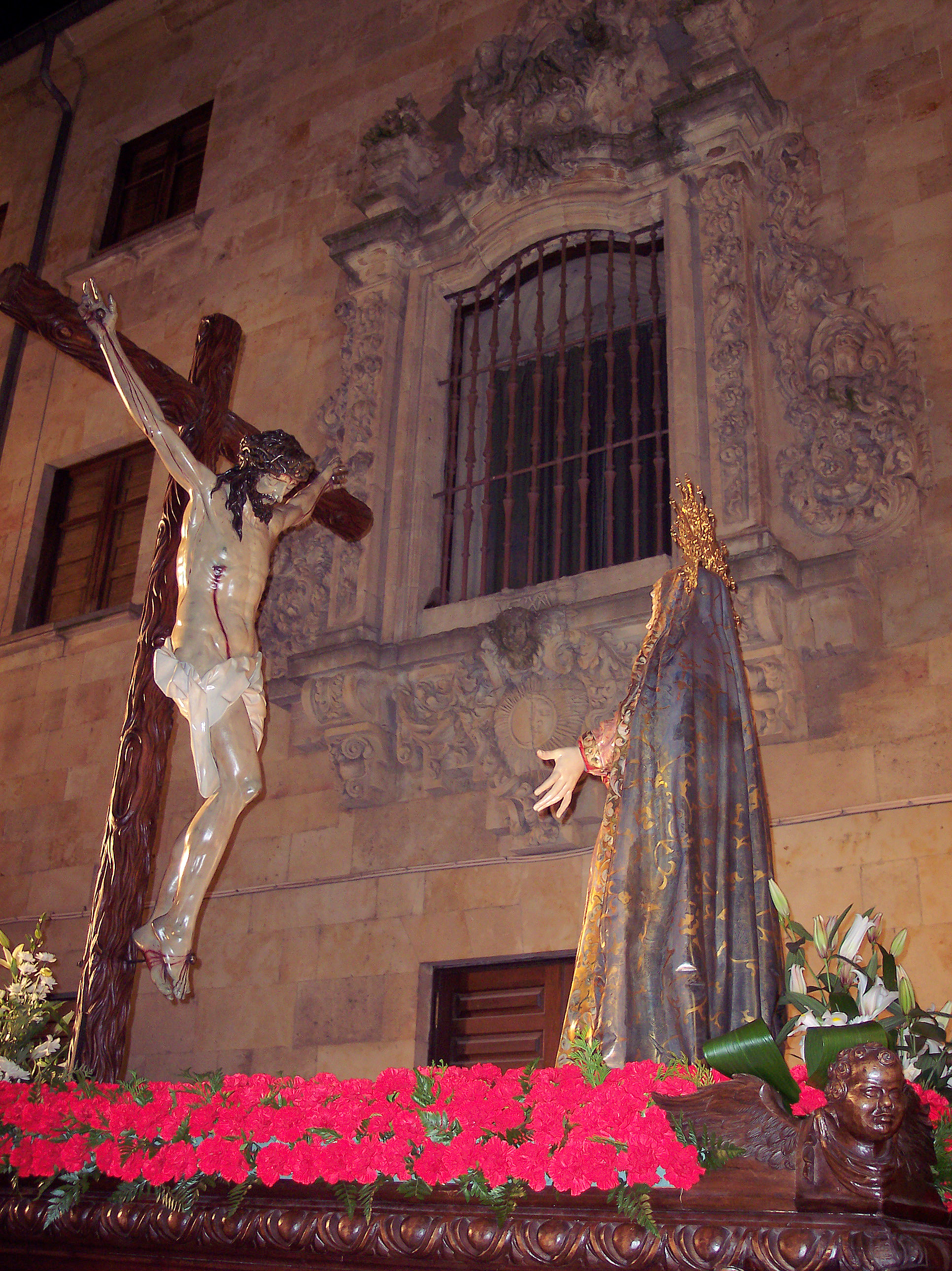 El paso de la Hermandad Universitaria en la Calle Libreros. Stmo.Cristo de la Luz y Ntra. Sra. Madre de la Sabiduría. Paso de la Hermandad de los Estudiantes de Salamanca.